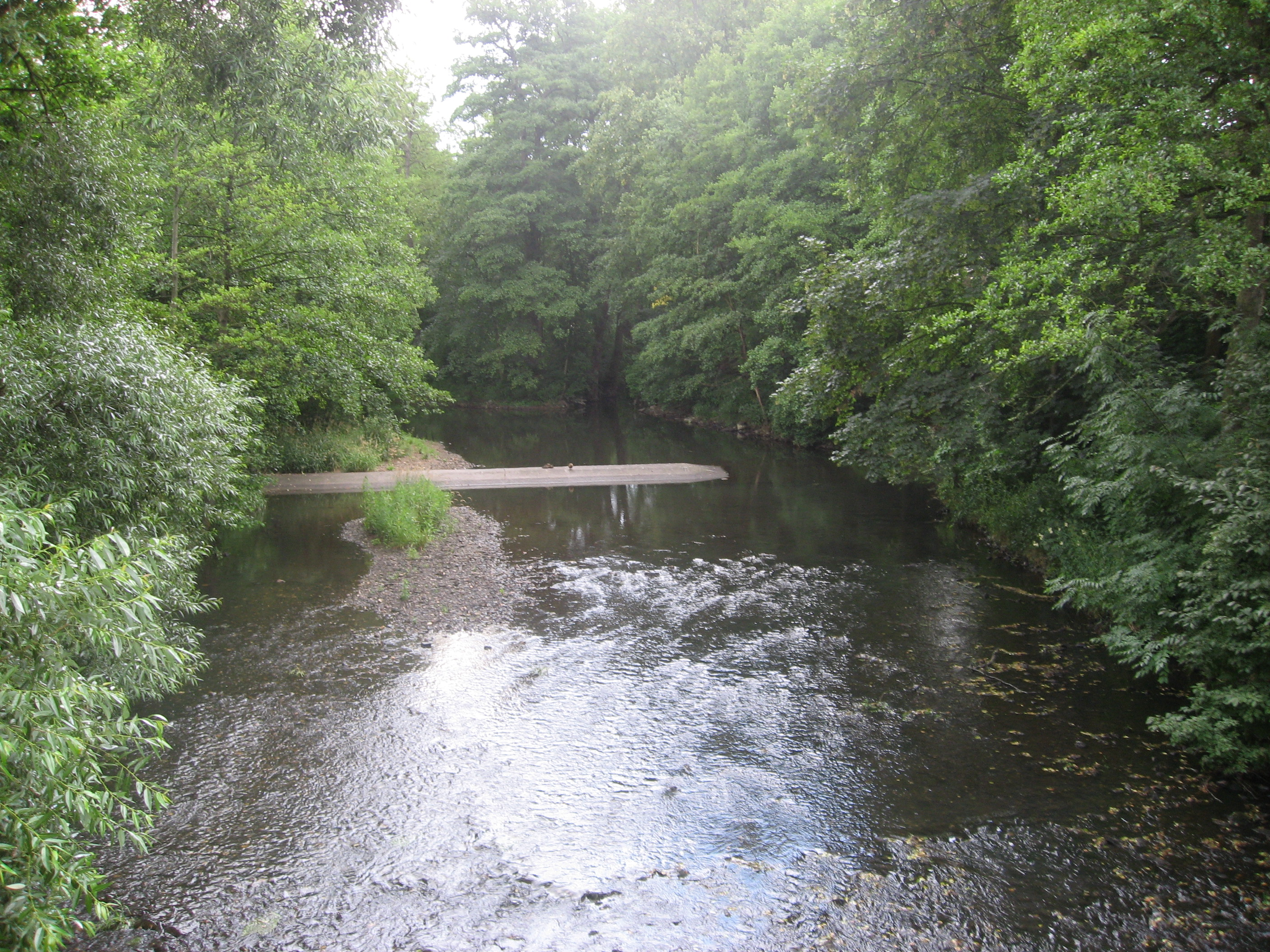 Trnava v Želivi